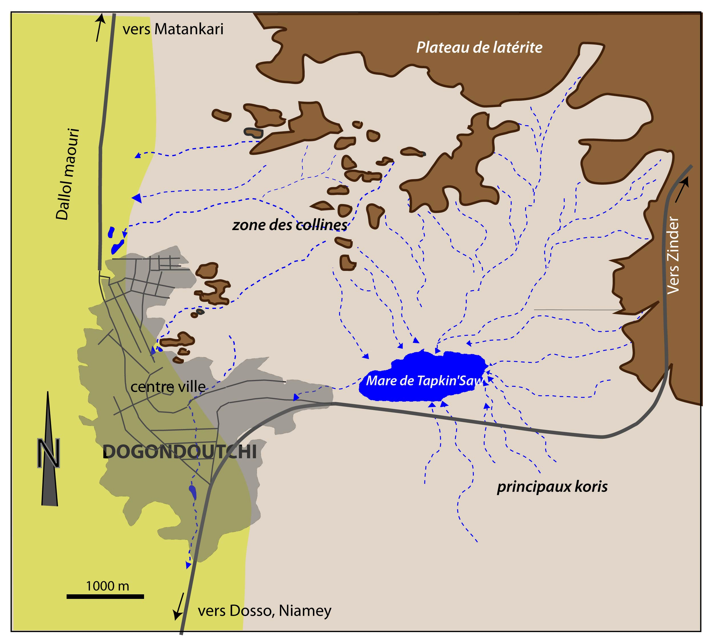 Carte orogéographique de Dogondoutchi et de ses environs